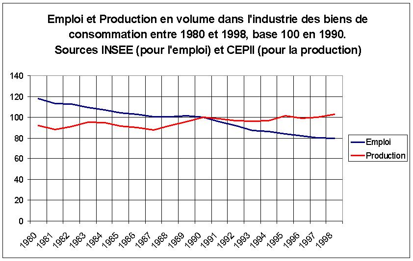 Production et Emploi dans l'Industrie des biens de consommation de 1980 à 1998, base 100 en 1990, source INSEE et CEPII. Sources : Licensing Catégorie:Schémas